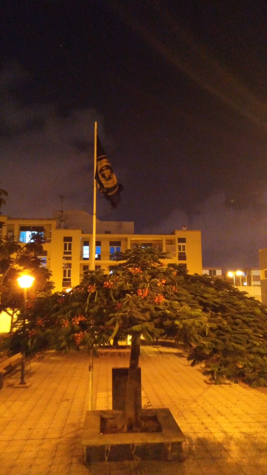 Plaza de los Bomberos Las Palmas de Gran Canaria